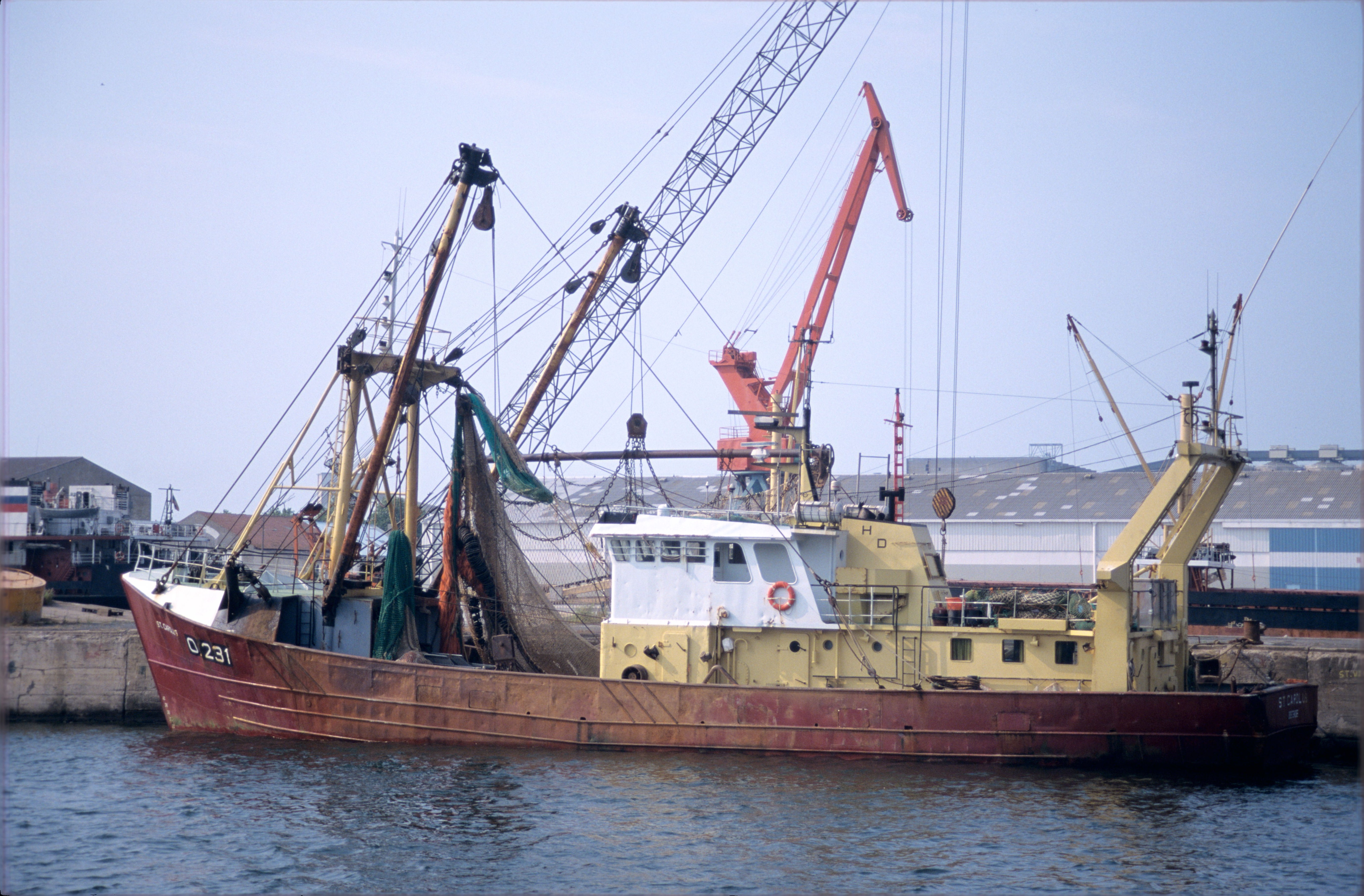 Le chalutier à perche belge "St. Carolus" dans le port de commerce de La Rochelle-Pallice. La Rochelle, Charente Maritime, France. On peut distinguer (côté quai) un des deux chaluts qui est suspendu à la perche (mât) par le câble de remorque qui passe par une grosse poulie appelée "cloche de tangon". Le chalut qui forme une poche est attaché au portique et se termine dans sa partie la plus étroite par un noeud (raban de cul) fermant cette poche. Les chalutiers à perche sont utilisés pour la pêche à la crevette et aux poissons de fond (poisssons plats), la sole par exemple. Le St. Carolus est un chalutier à perche de forte puissance.